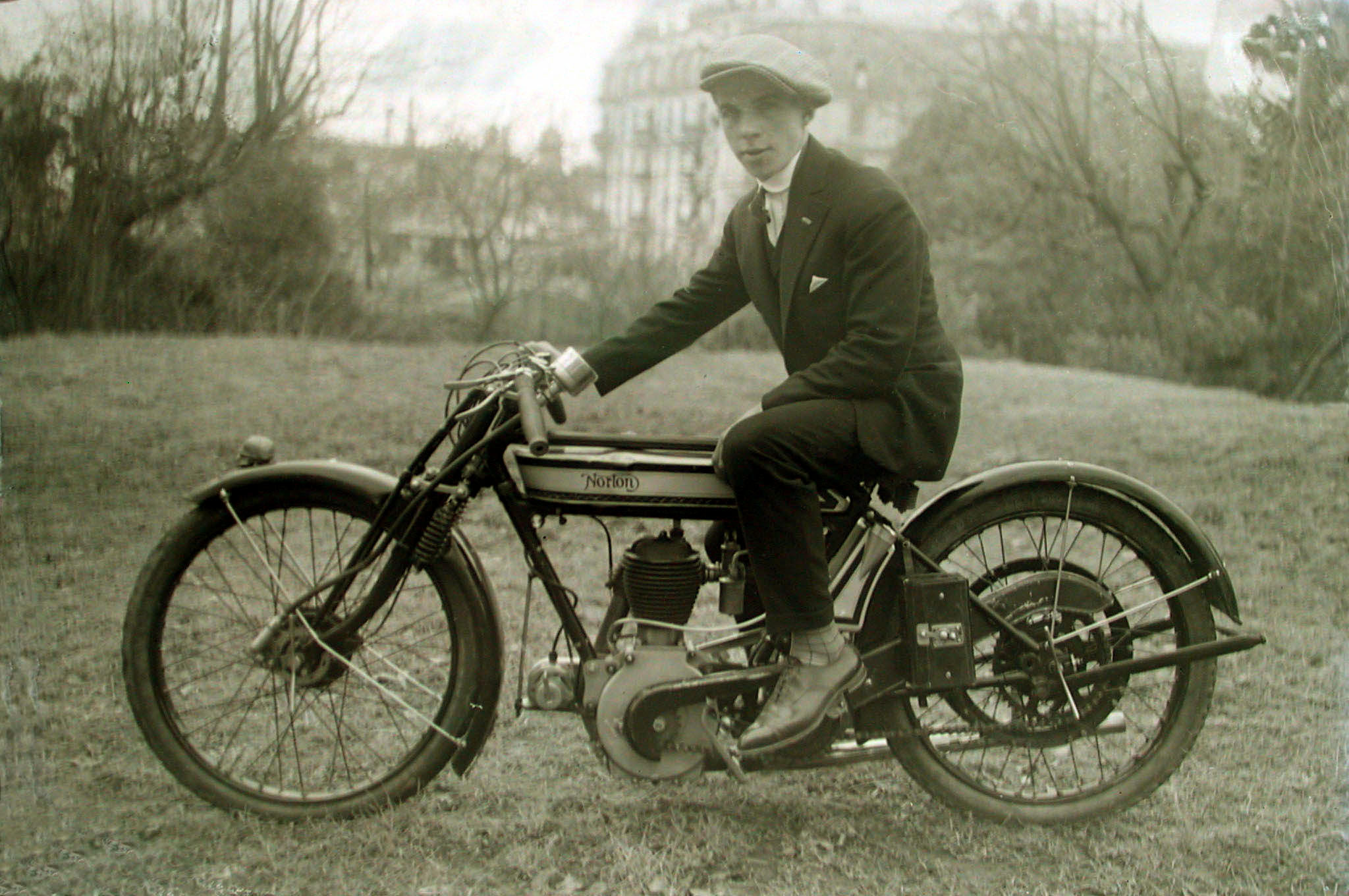 Norton 490cc3 latéral, 1921